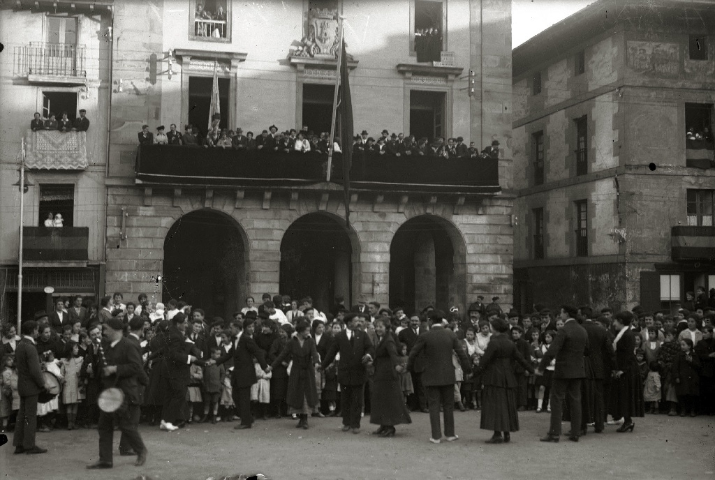 Título original: Grupo de personas por las calles de Ordizia (3/3) Localización: Ordicia (Guipúzcoa)